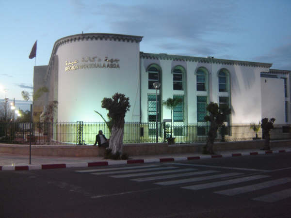 Local de la région Doukkala-Abda.